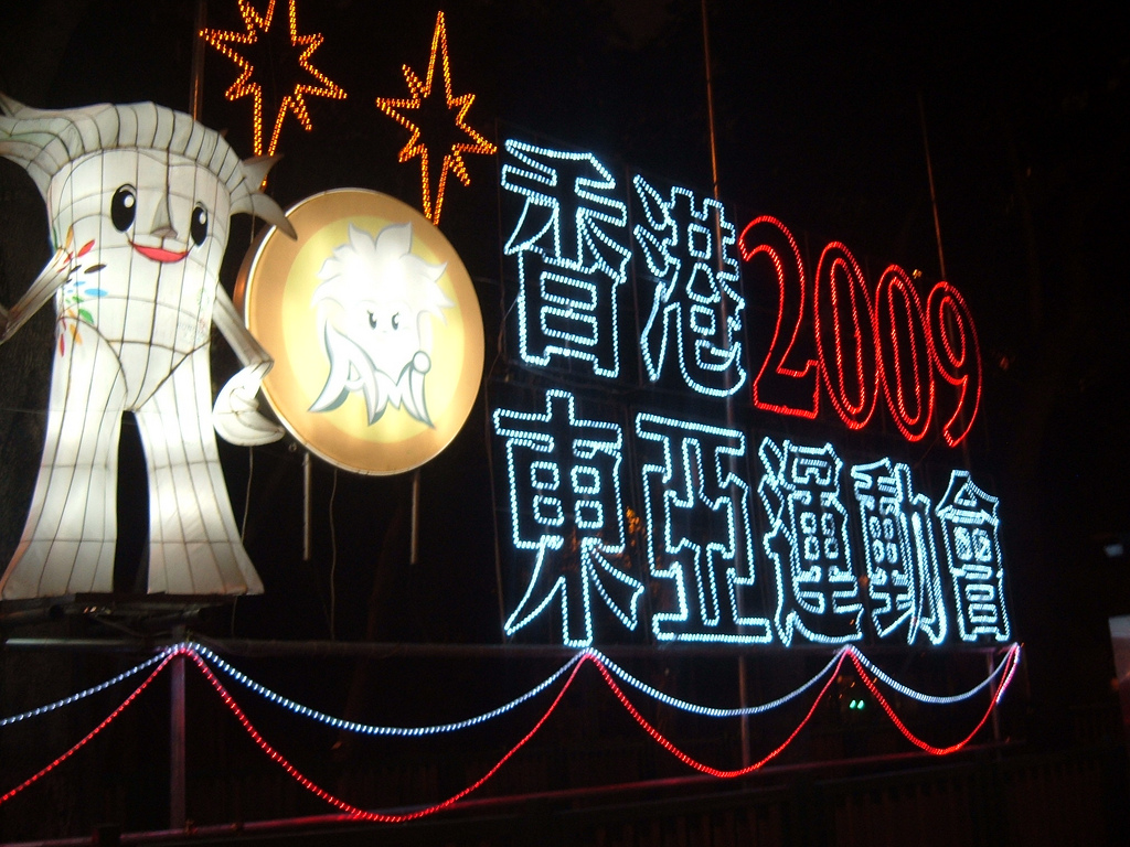 Hong Kong 2009 East Asian Games sign